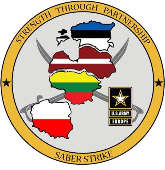 Saber Strike 2015 Logo